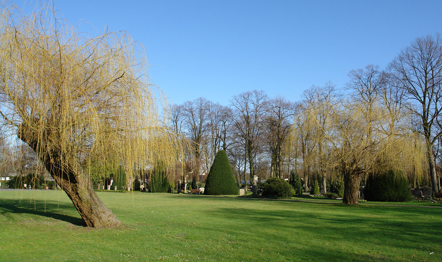 Situation auf dem Waller Friedhof in Bremen, in der Nähe des Friedhof-Haupteingangs.